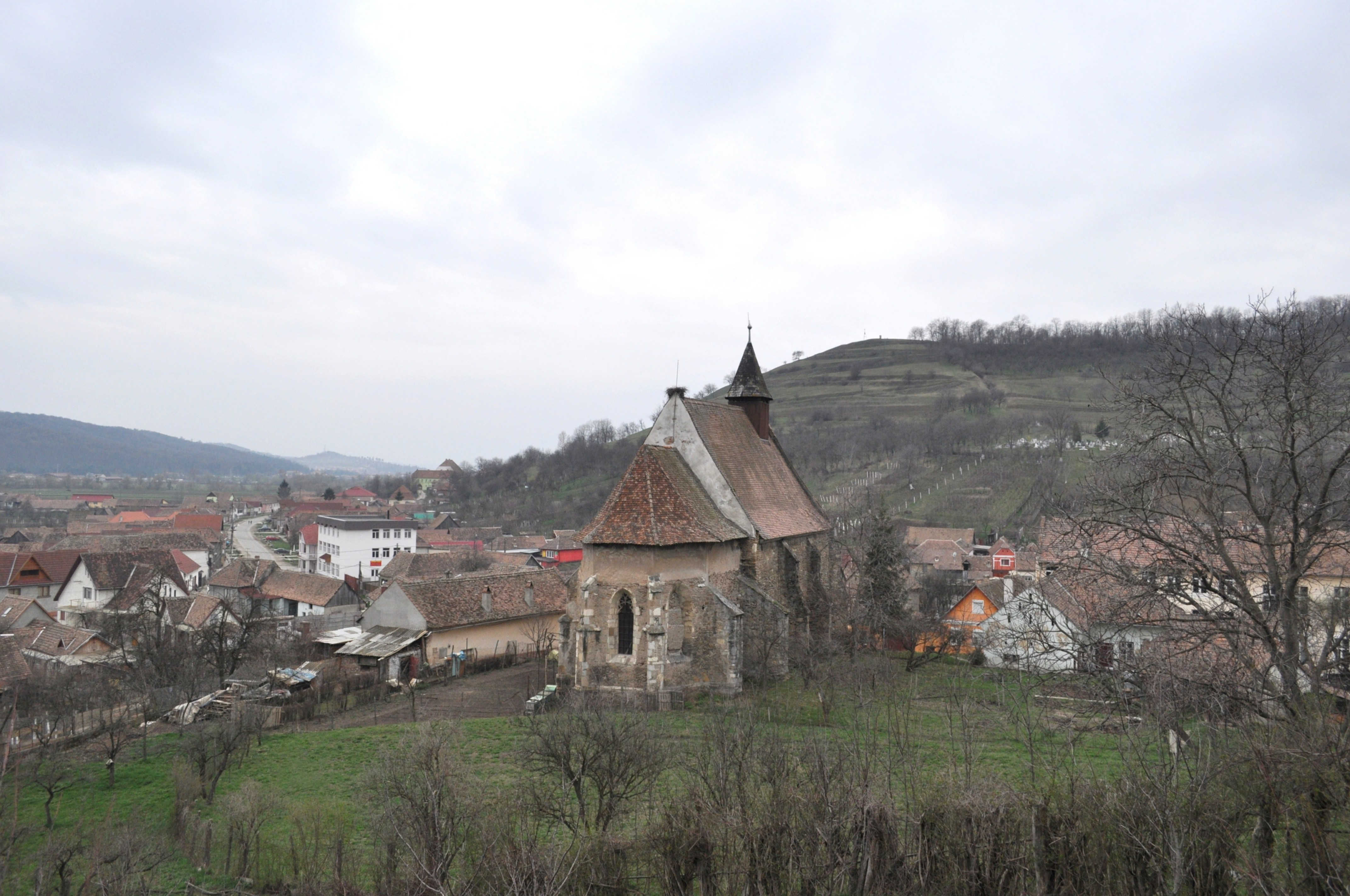 Biserica evanghelică, sat DÂRLOS; comuna DÂRLOS, județul Sibiu